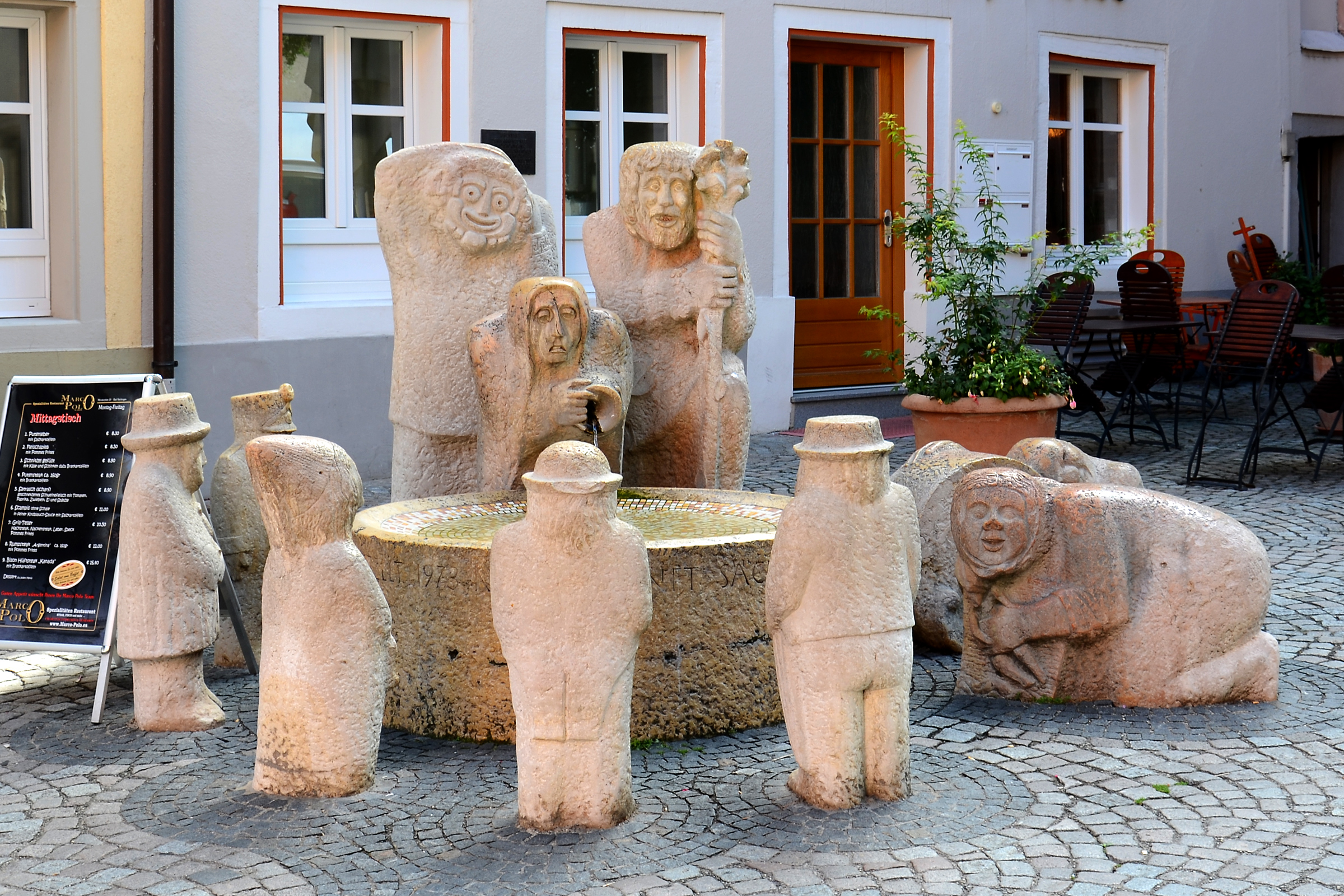 Bad Säckingen, Narrenbrunnen